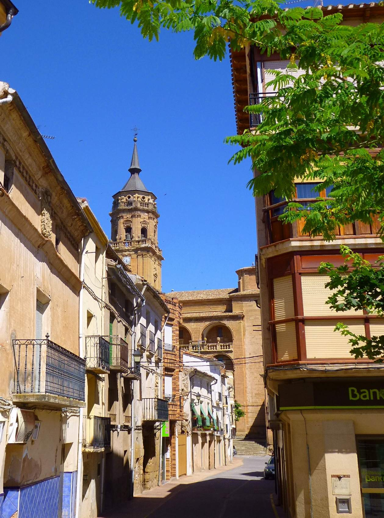 Murillo de Río Leza (La Rioja)